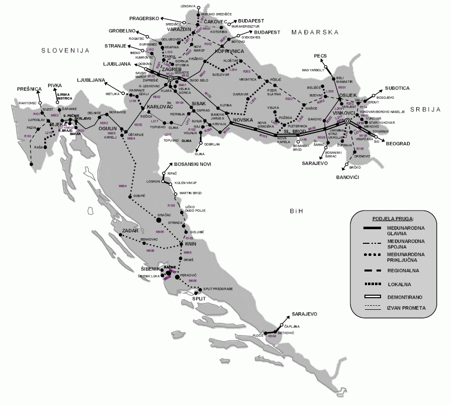 Paneuropski željeznički prometni koridori na teritoriju Republike Hrvatske